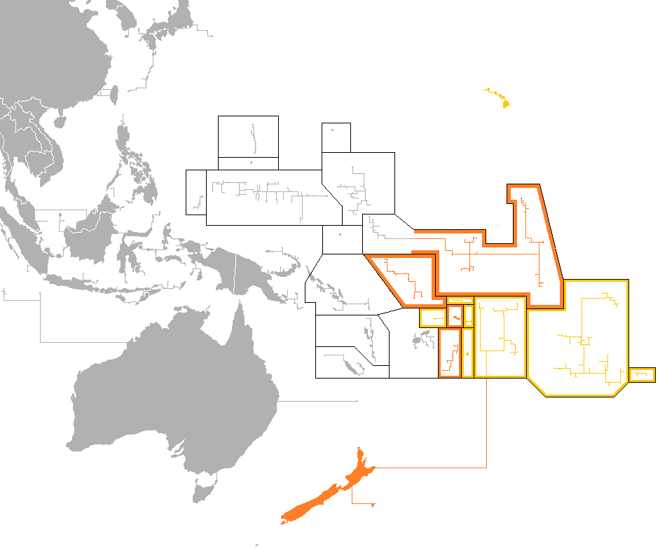 Mapa de Polinesia. Países soberanos Terrotorios dependientes